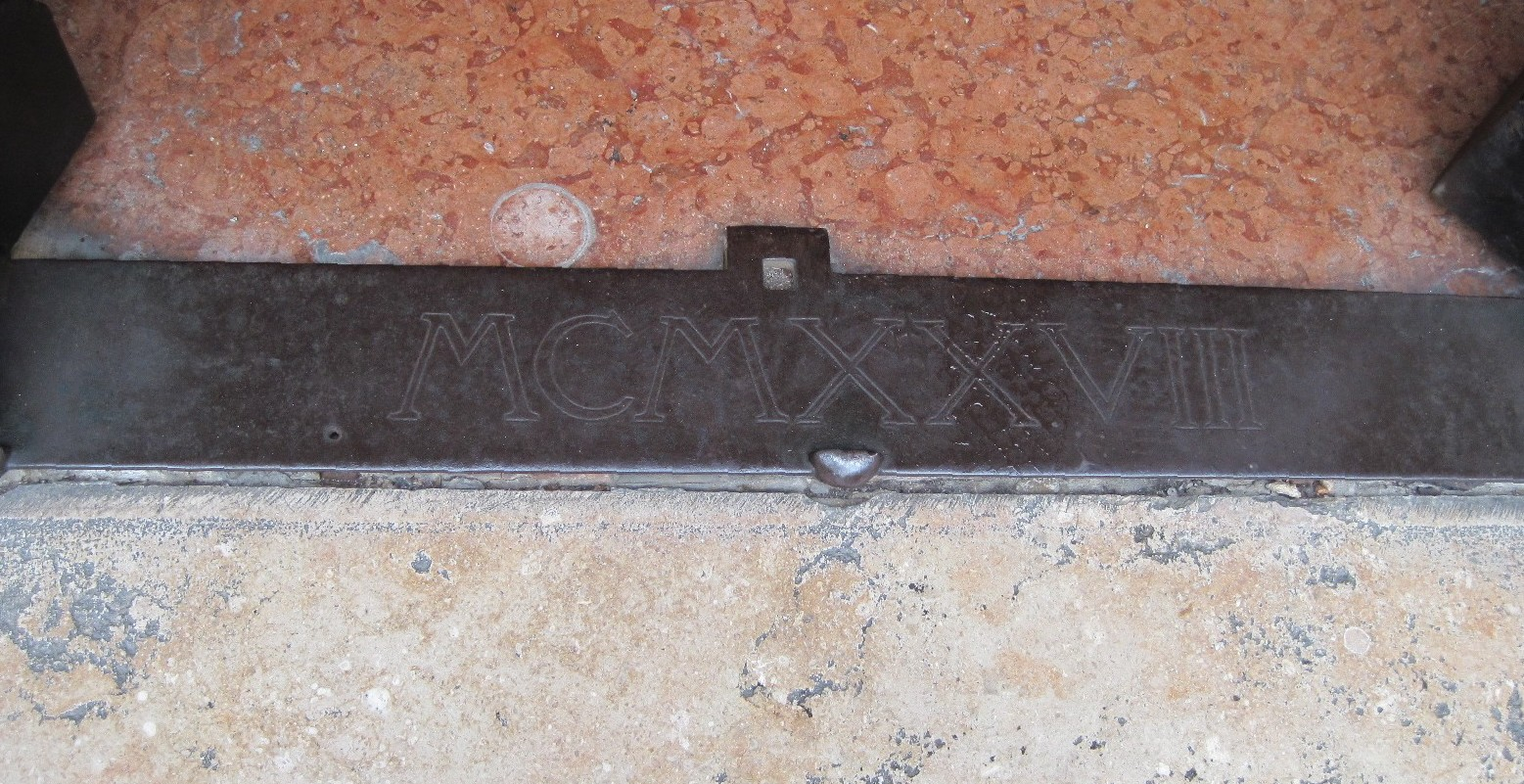 Ferrara - Torre della Vittoria - ingresso loggia della statua della Vittoria del Piave. scritta alla base del cancello che riporta la data 1928, normalmente non visibile a cancello chiuso.